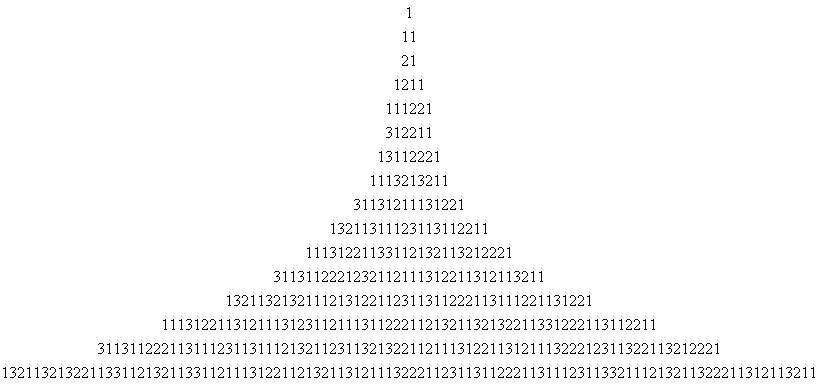 La fonction de Conway (suite de Conway) en PHP. Image-schéma créée le 08-02-2007.